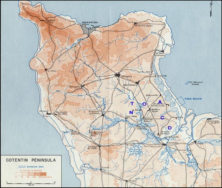 Description : Carte du Cotentin avec indication des DZ Source : Wikimedia : File:Cotentin Peninsula.jpg Remarque : les emplacements des DZ ont été ajoutées par l'auteur